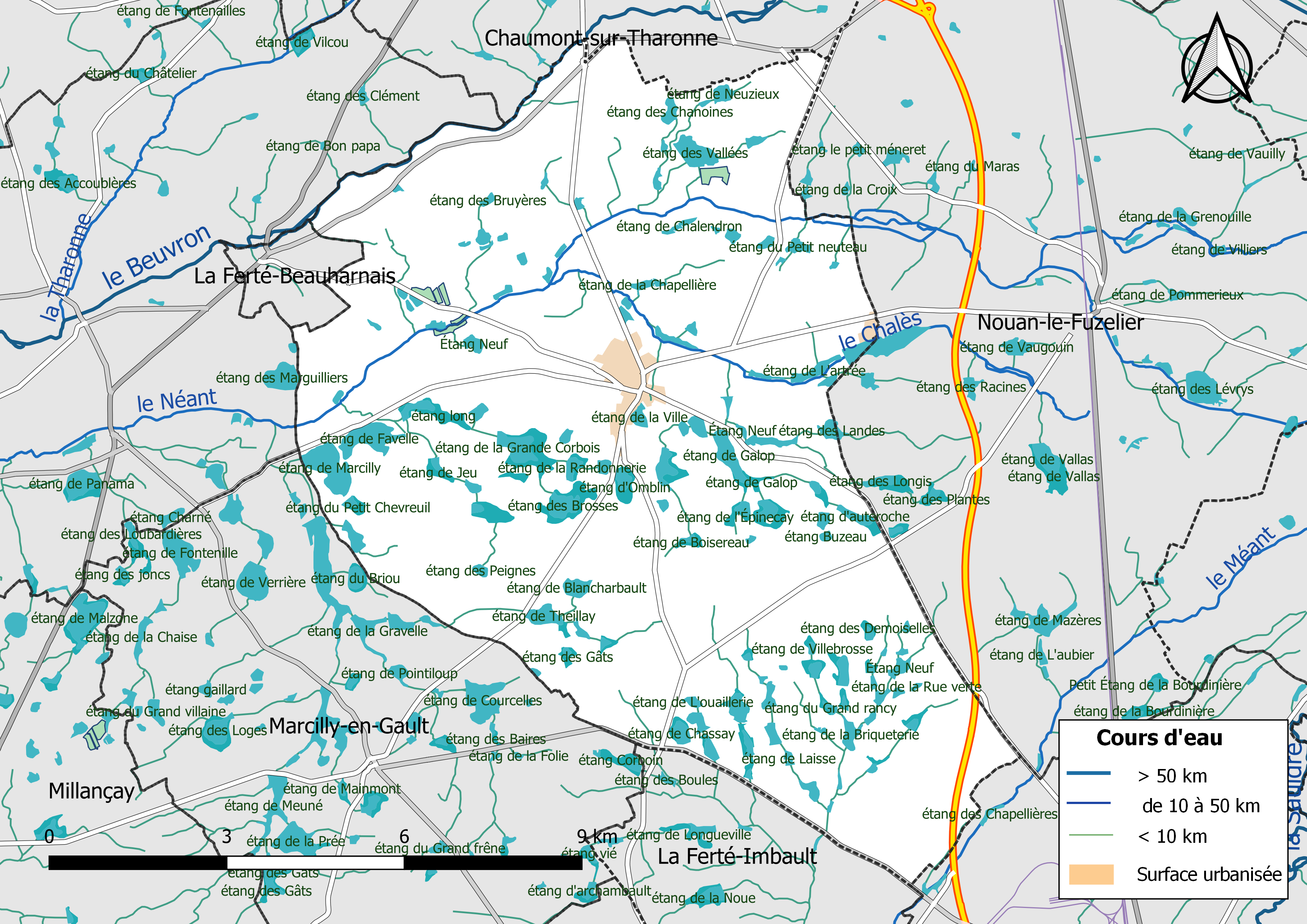 Carte du réseau hydrographique de la commune de Saint-Viâtre (Loir-et-Cher, France).